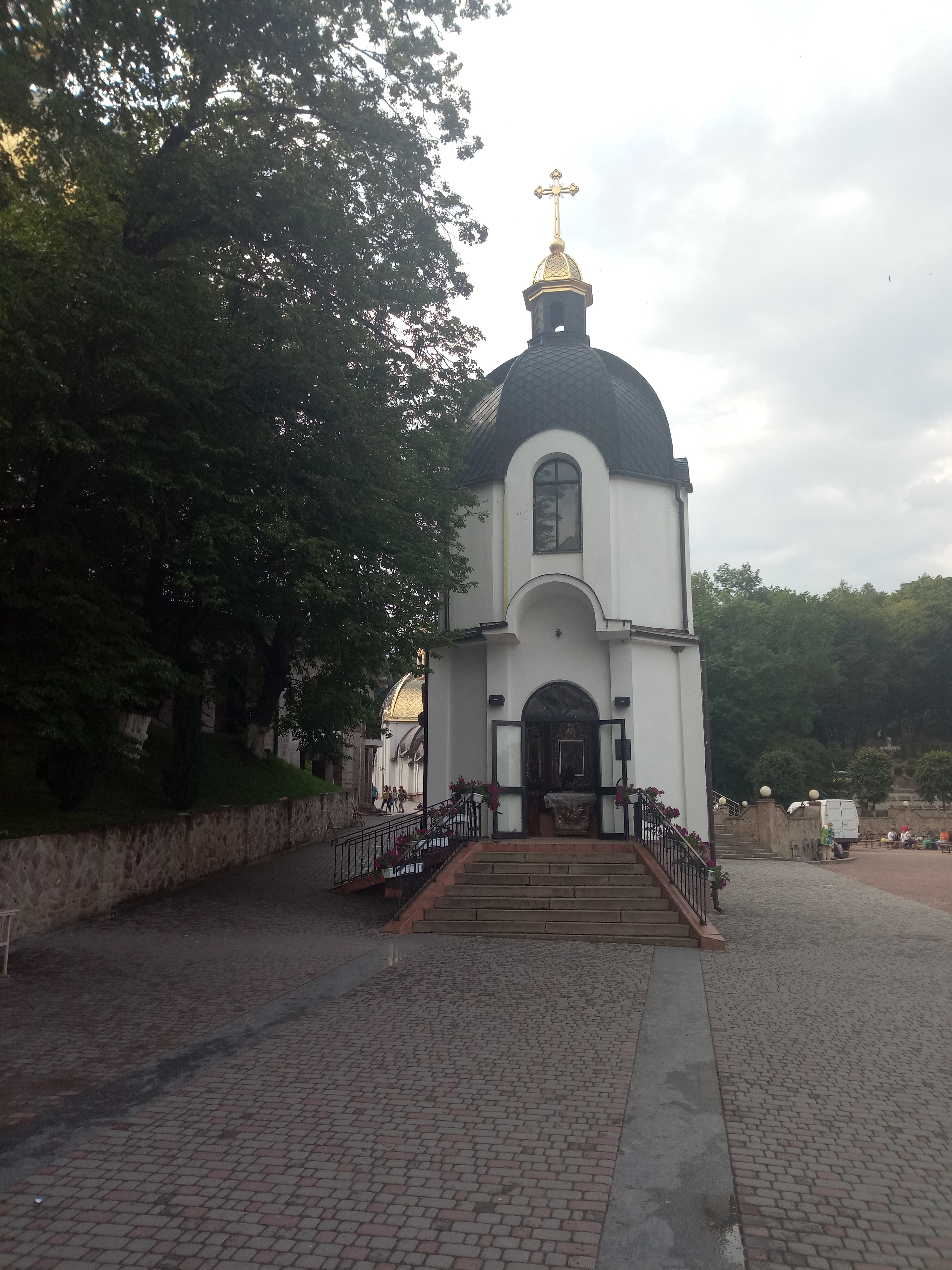 Зарваниця каплиця з копією ікони матінки Божої фото